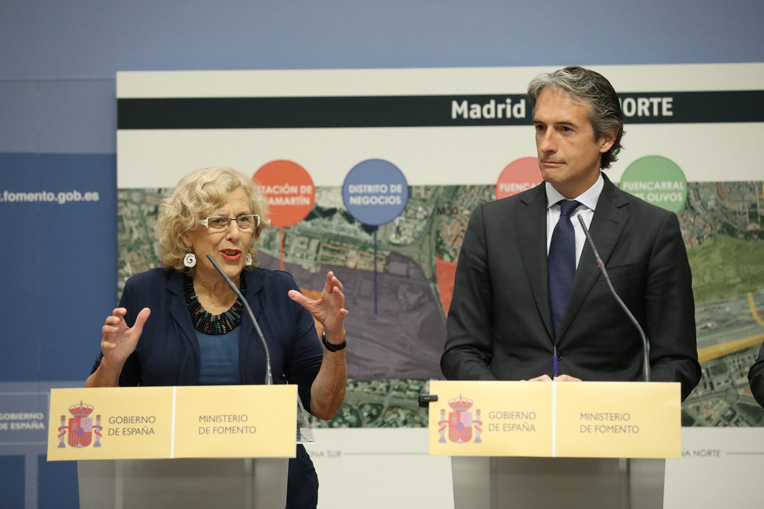 El Ayuntamiento de Madrid, el Ministerio de Fomento-ADIF y la empresa Distrito Castellana Norte (DCN) han confirmado esta mañana (jueves, 27 de julio) las bases para la ordenación urbanística del espacio rebautizado como ‘Madrid Nuevo Norte’, cuyo objetivo es impulsar el desarrollo de la zona norte de la capital, paralizado durante 25 años.